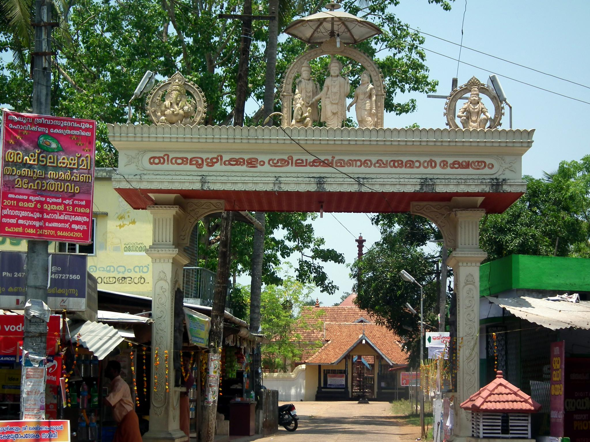 Malayalam: കേരളത്തിലെ പ്രസിദ്ധമായ ലക്ഷ്മണ ക്ഷേത്രമാണ് തിരുമൂഴിക്കുളം ലക്ഷ്മണപെരുമാൾ ക്ഷേത്രം. എറണാക്കുളം ജില്ലയുടെ വടക്കേയറ്റം ആലുവായ്ക്കും മാളയ്ക്കുമിടയിൽ മൂഴിക്കുളം ക്ഷേത്രം സ്ഥിതി ചെയ്യുന്നു. ലക്ഷ്മണന്റെ പൂർണ്ണ പ്രതിഷ്ഠയോടെ പ്രധാന ദേവനായി ആരാധിക്കുന്ന ഈ ക്ഷേത്രം പുരാതന കാലം മുതൽക്കുതന്നെ കേരളത്തിൽ ആരാധിച്ചു പോരുന്ന 108 വൈഷ്ണവ ക്ഷേത്രങ്ങളിൽ ഒന്നാണ്. ഈ ക്ഷേത്രങ്ങളിൽ ലക്ഷ്മണ പ്രതിഷ്ഠ മൂഴിക്കുളം ക്ഷേത്രത്തിൽ മാത്രമേയുള്ളു.